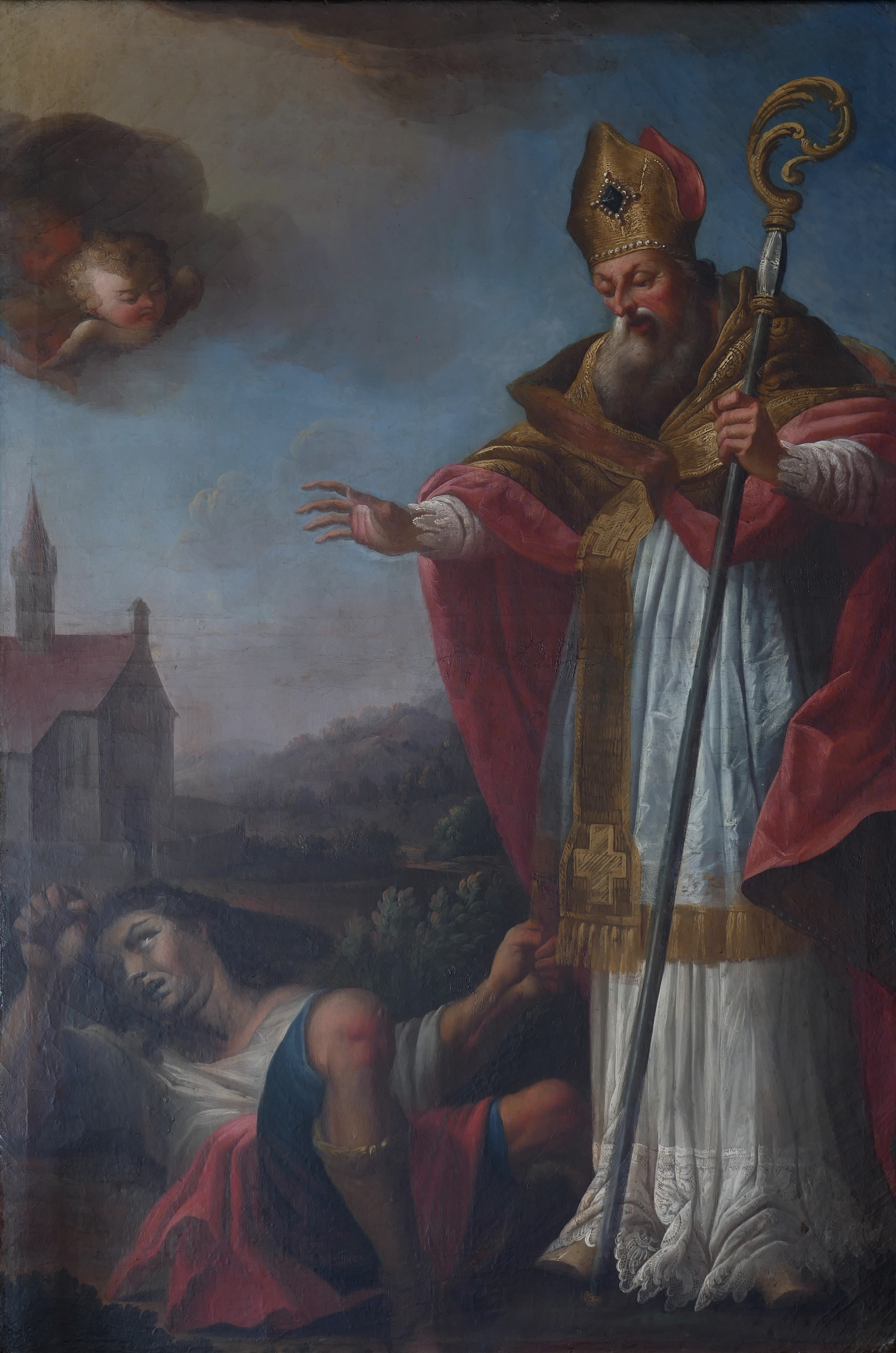 Alsace, Bas-Rhin, Chapelle Notre-Dame d'Altbronn d’Ergersheim (IA67011819). Autel secondaire (XVIIIe-XIXe) avec tableau "St-Valentin": This object is classé Monument Historique in the base Palissy, database of the French furniture patrimony of the French ministry of culture, under the references PM67000588 and IM67021207.